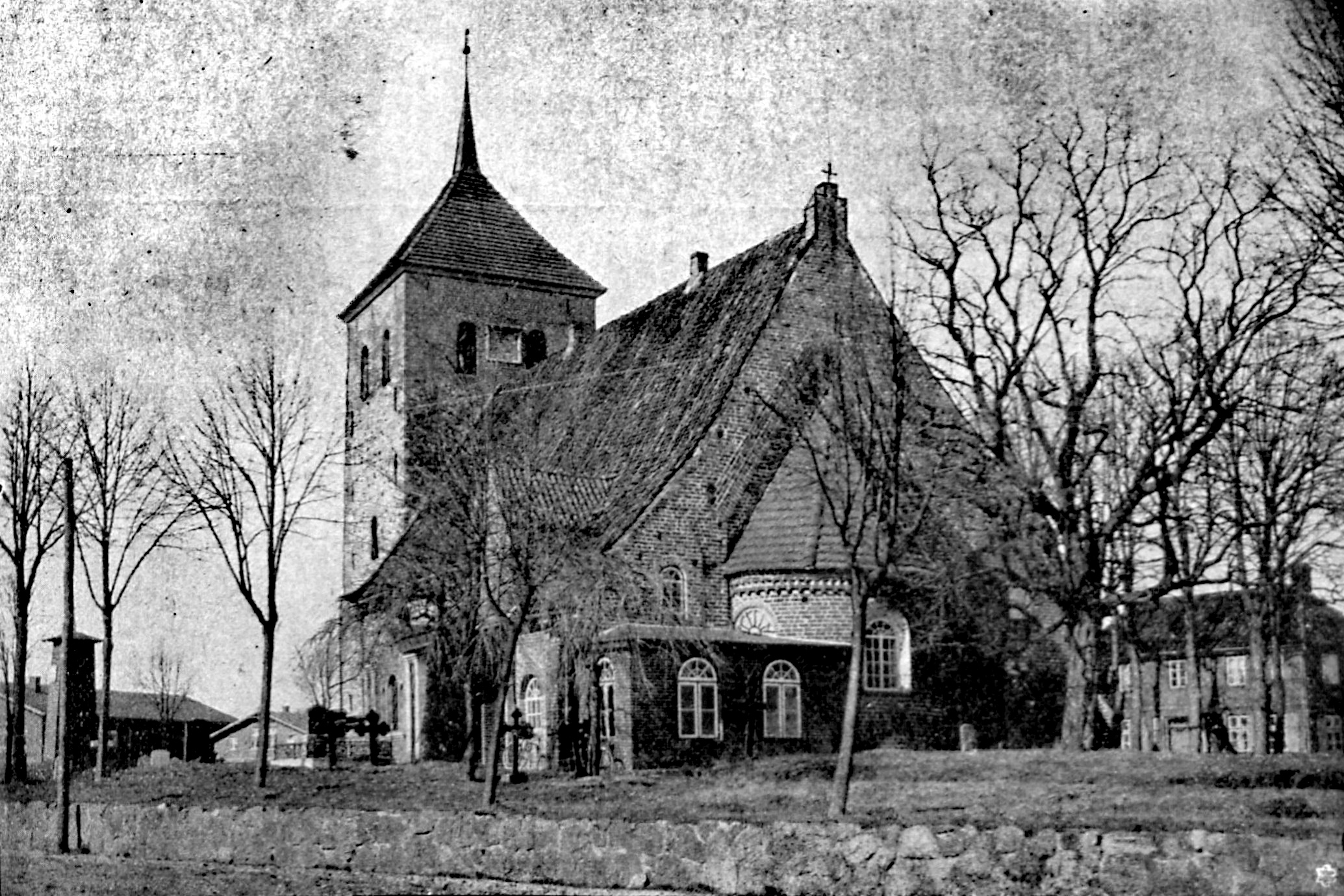 Die Kirche zu Rensefeld bei Lübeck